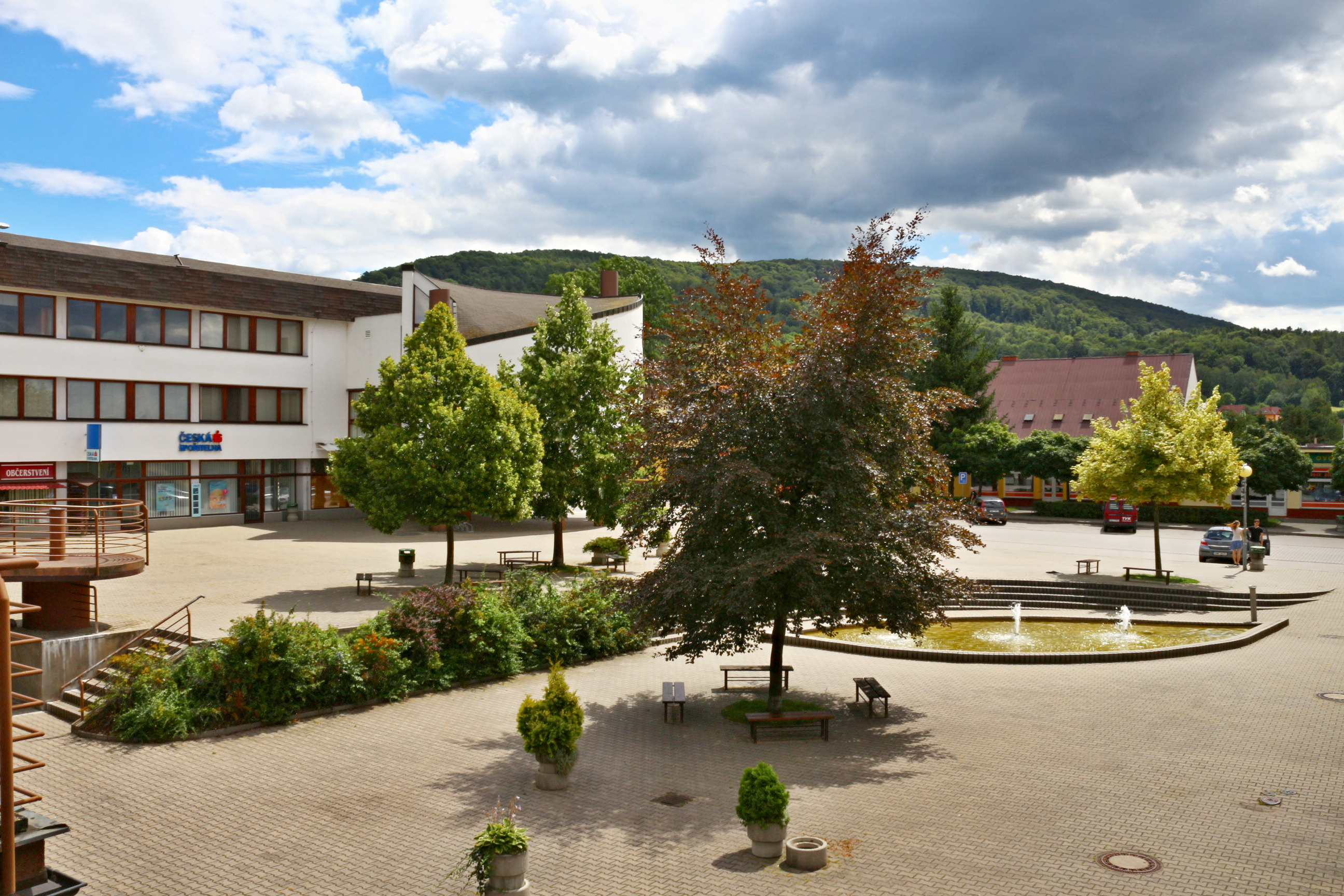 Náměstí Míru (Třemošnice)